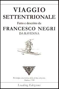 Copertina dell'edizione anastatica, pubblicata da Leading Edizioni, Bergamo